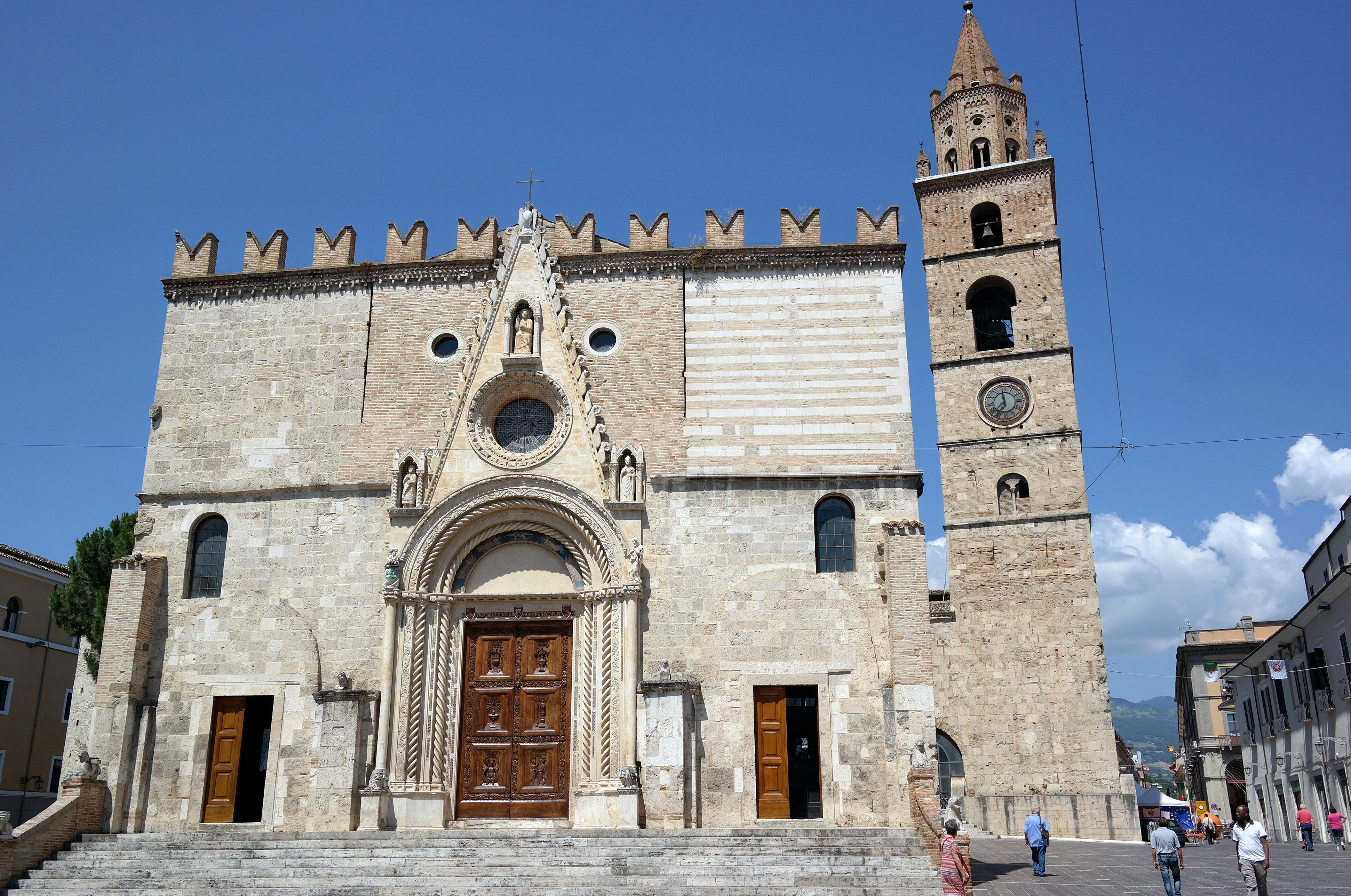 Esterno del Duomo di Teramo